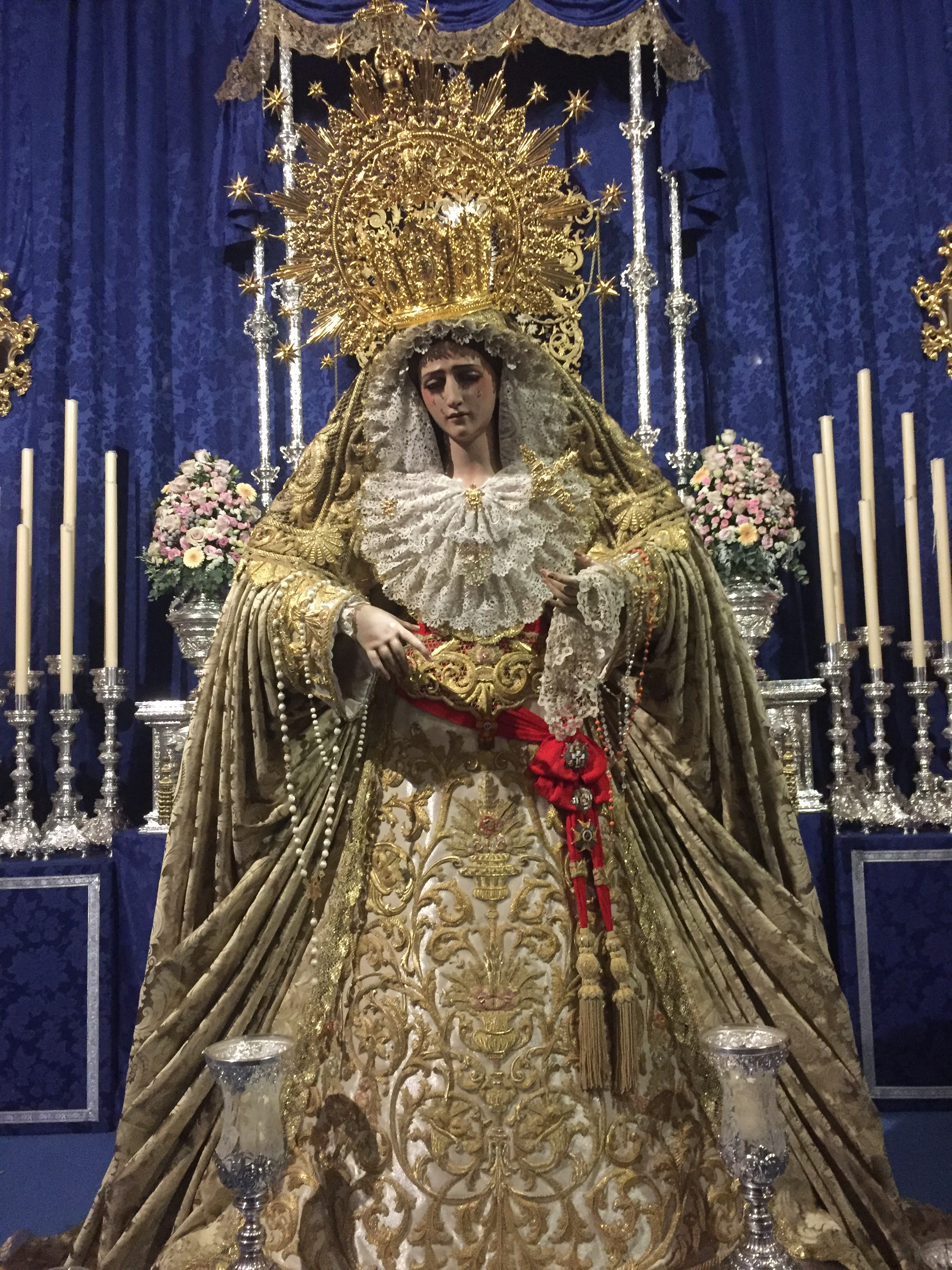 Rosario